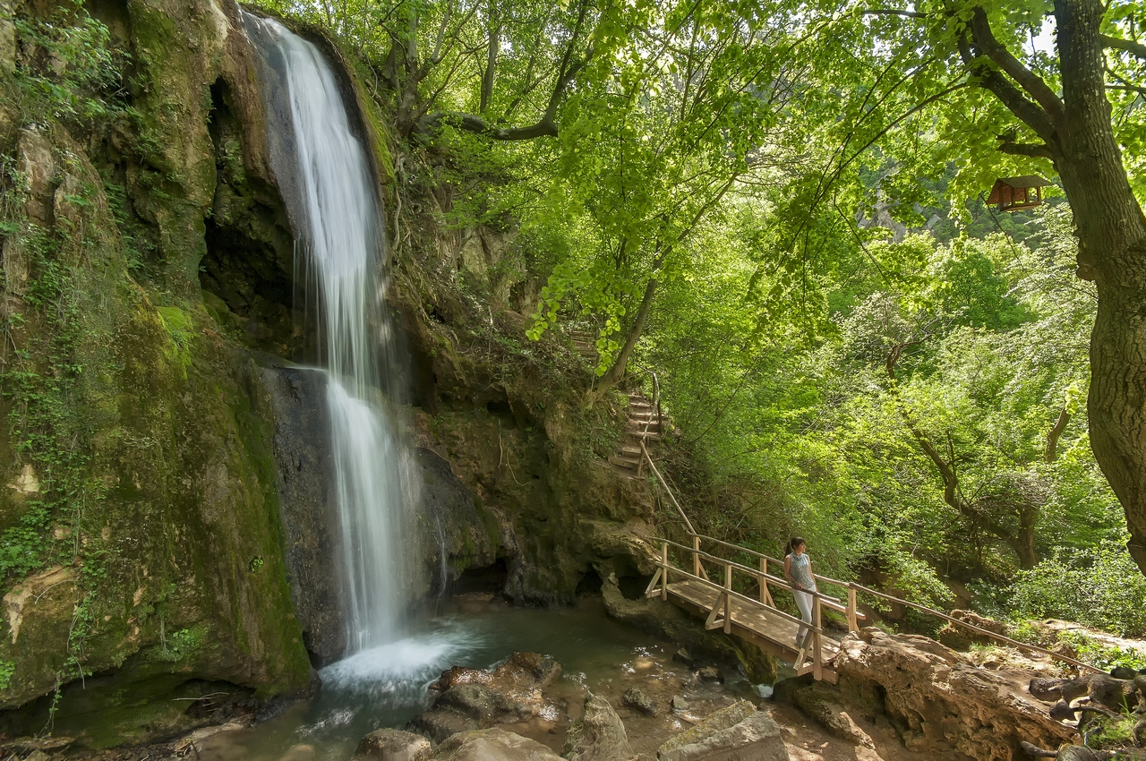 СП310 Споменик природе Рипаљка